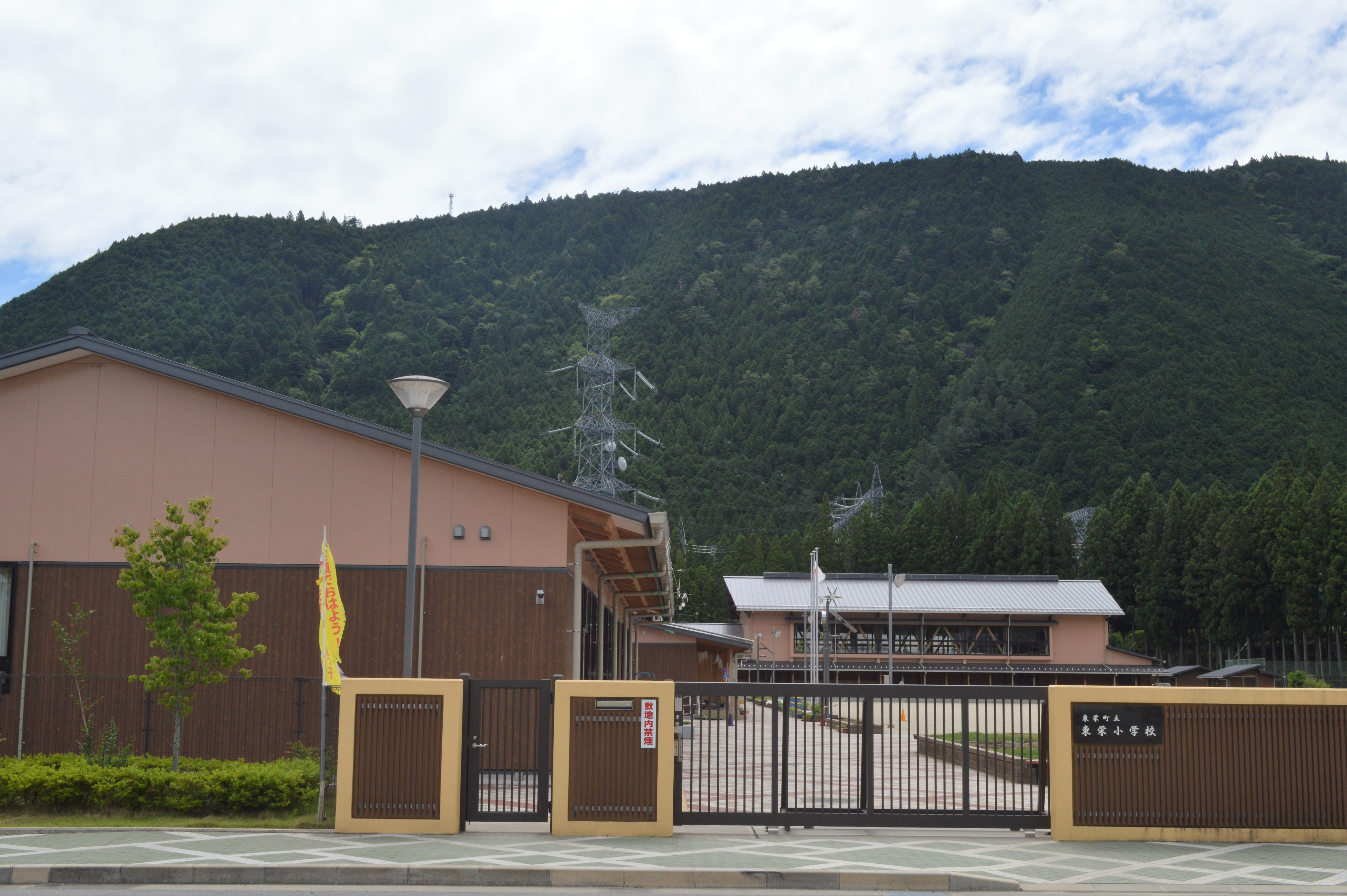 愛知県北設楽郡東栄町にある東栄町立東栄小学校。2013年竣工。